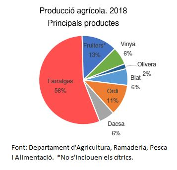 Diagrama de sectors sobre els principals productes en la producció agrícola a Catalunya el 2018. Dades extretes de l'Idescat i procedents del Departament d'Agricultura, Ramaderia, Pesca i Alimentació de la Generalitat de Catalunya.